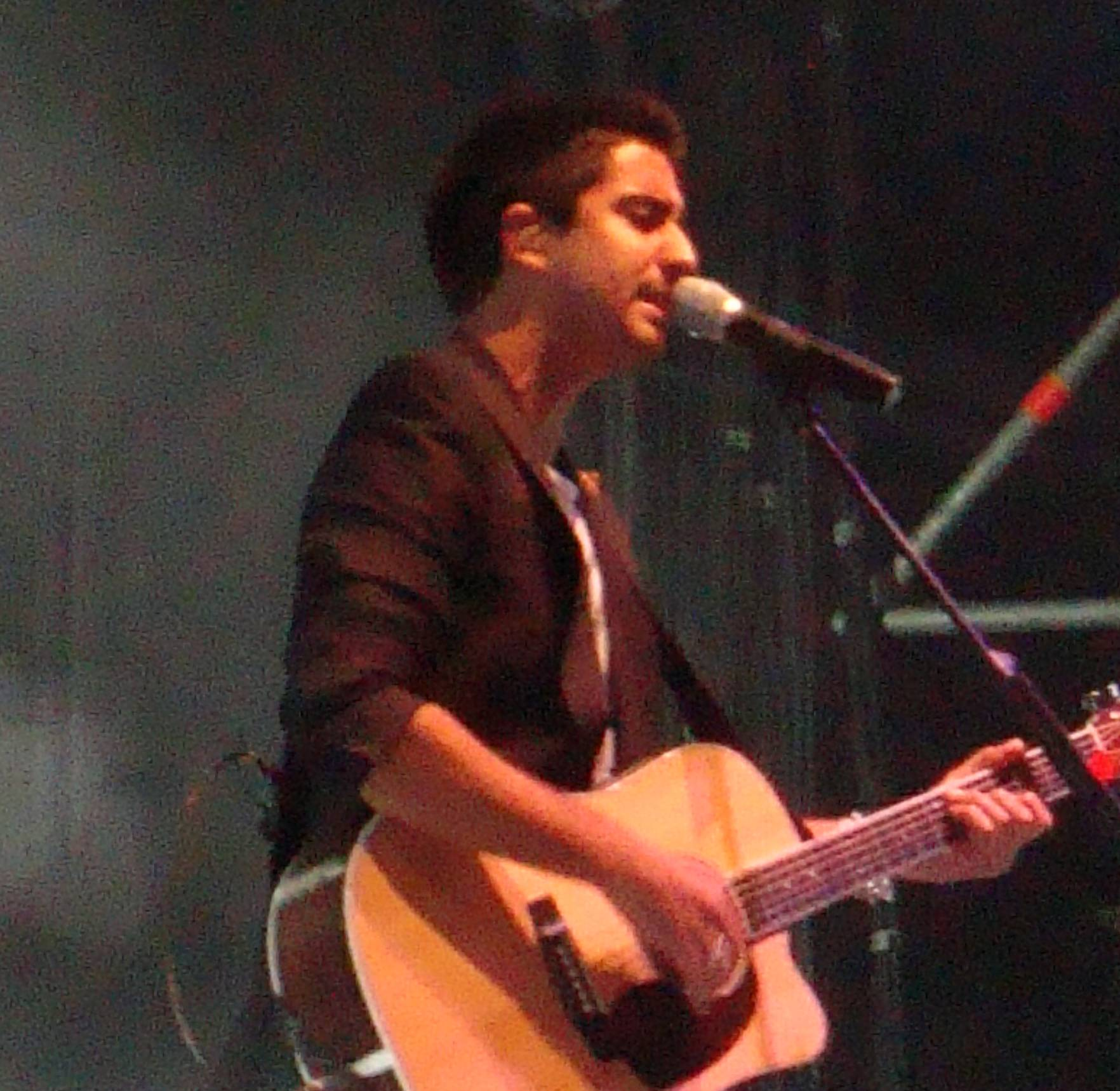 Alex Ubago en concert a les festes de la Mercè a Barcelona.